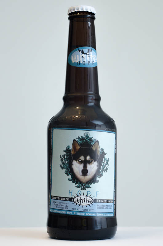 Weissbierbrauerei hopf white eisweissbier